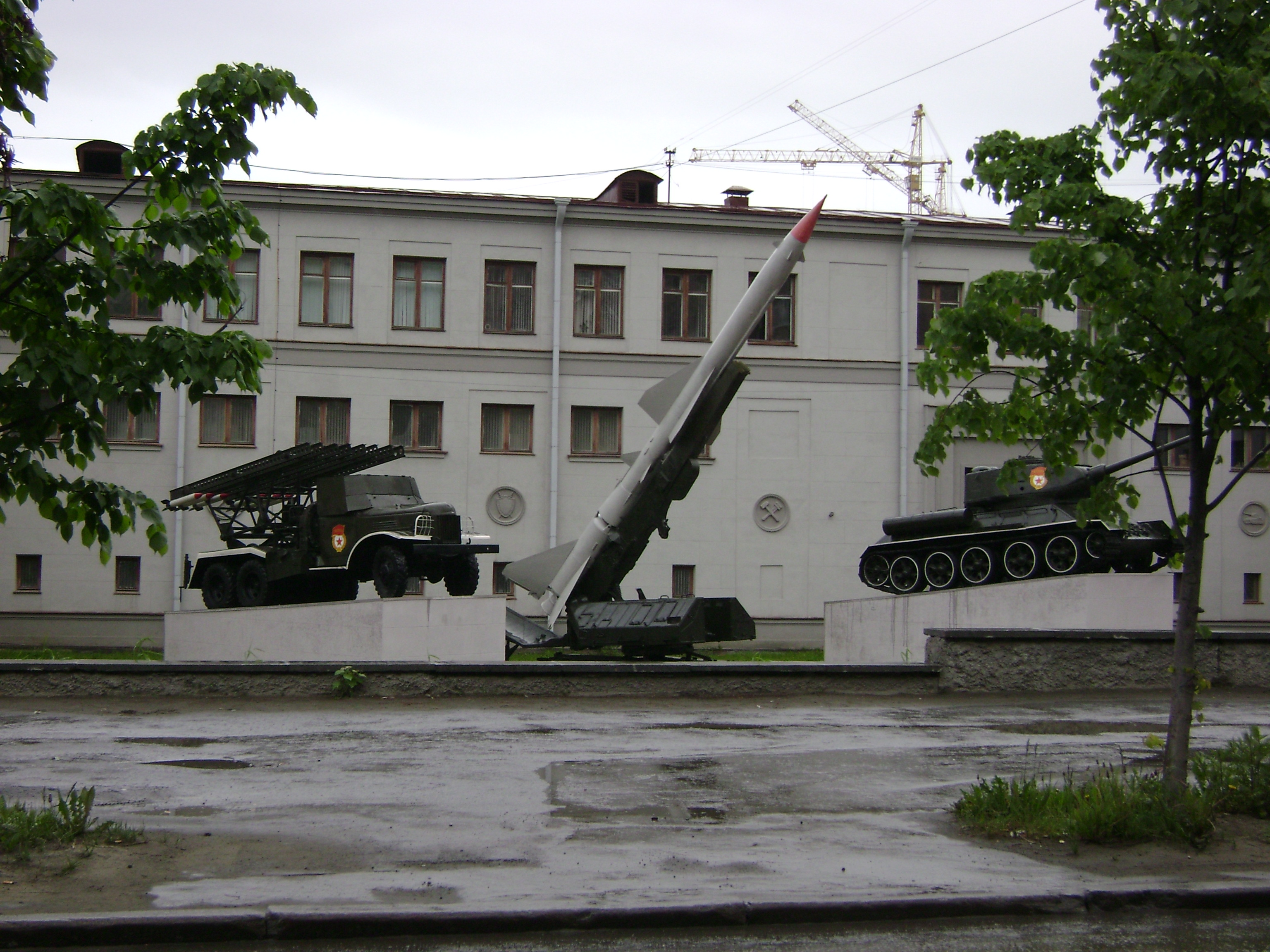 Военния музей-Екатеринбург-Русия.jpg